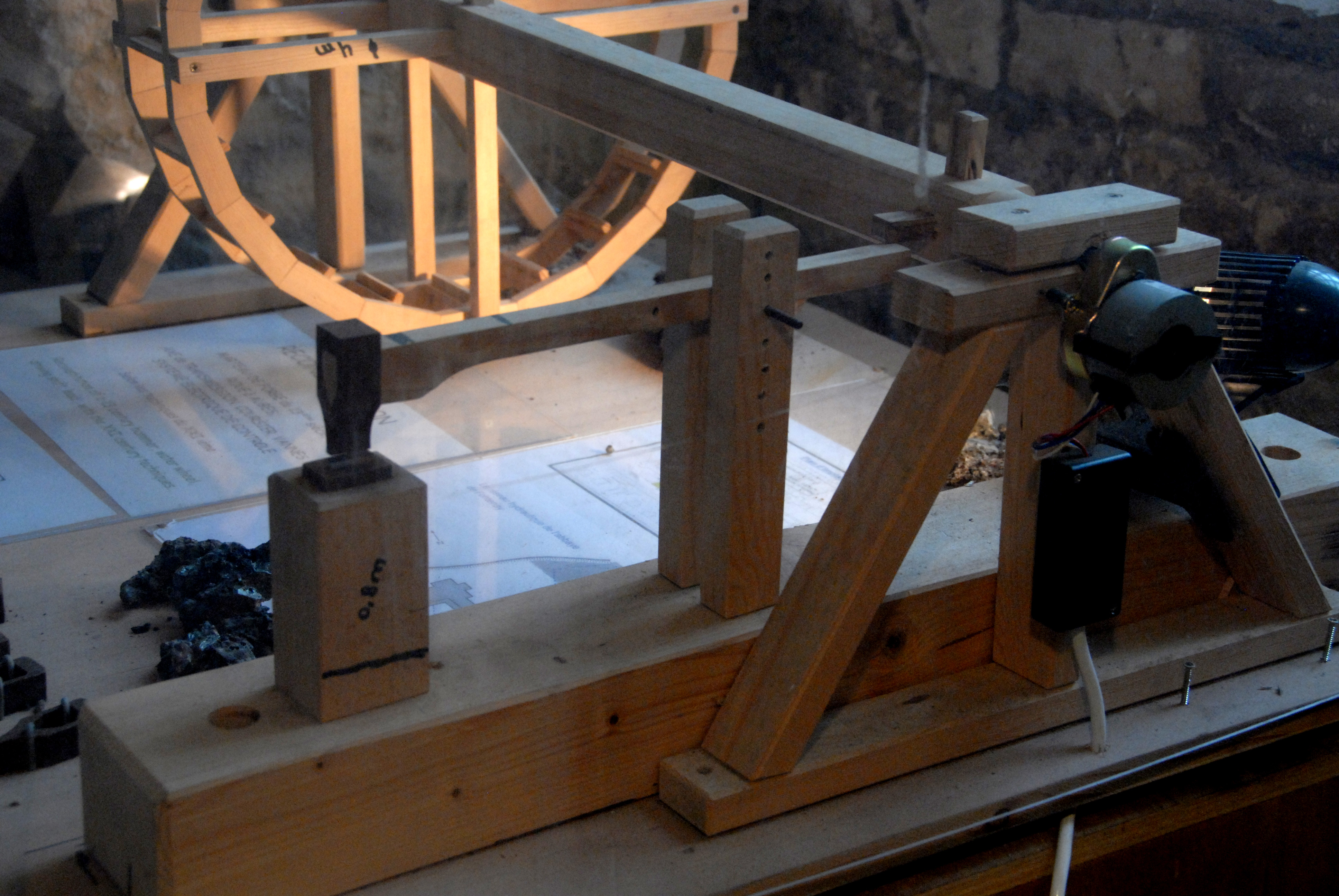 Abtei Fontenay, Schmiedehammer, Modell